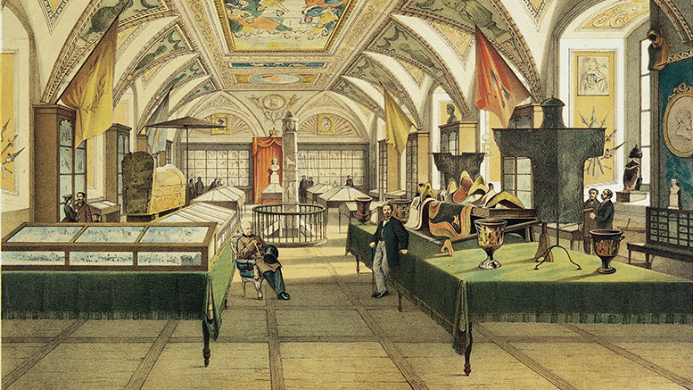 Albert Żamett. Interior. Vilno. Lietuvos nacionalinis muziejus